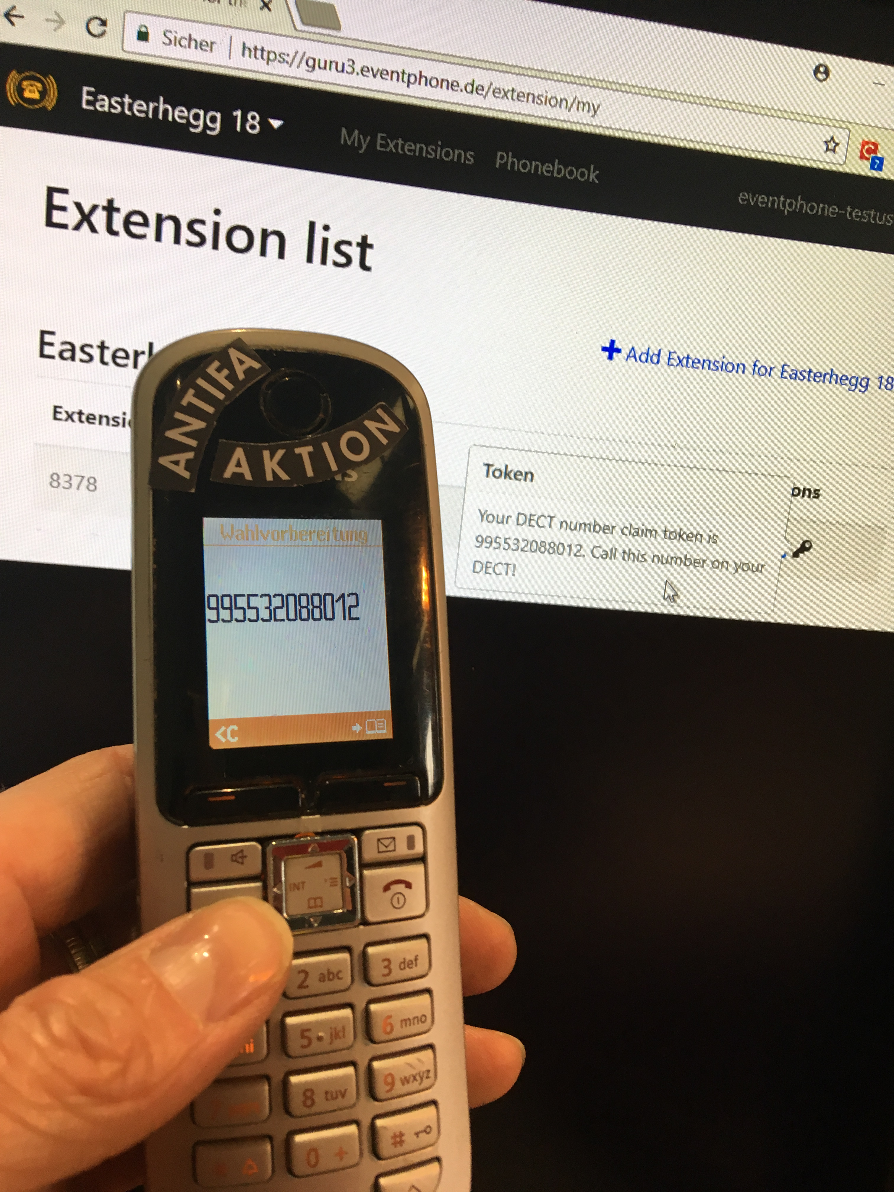 Eventphone DECT Selbst-Registrierung mit Claim-Token auf dem Easterhegg 2018.